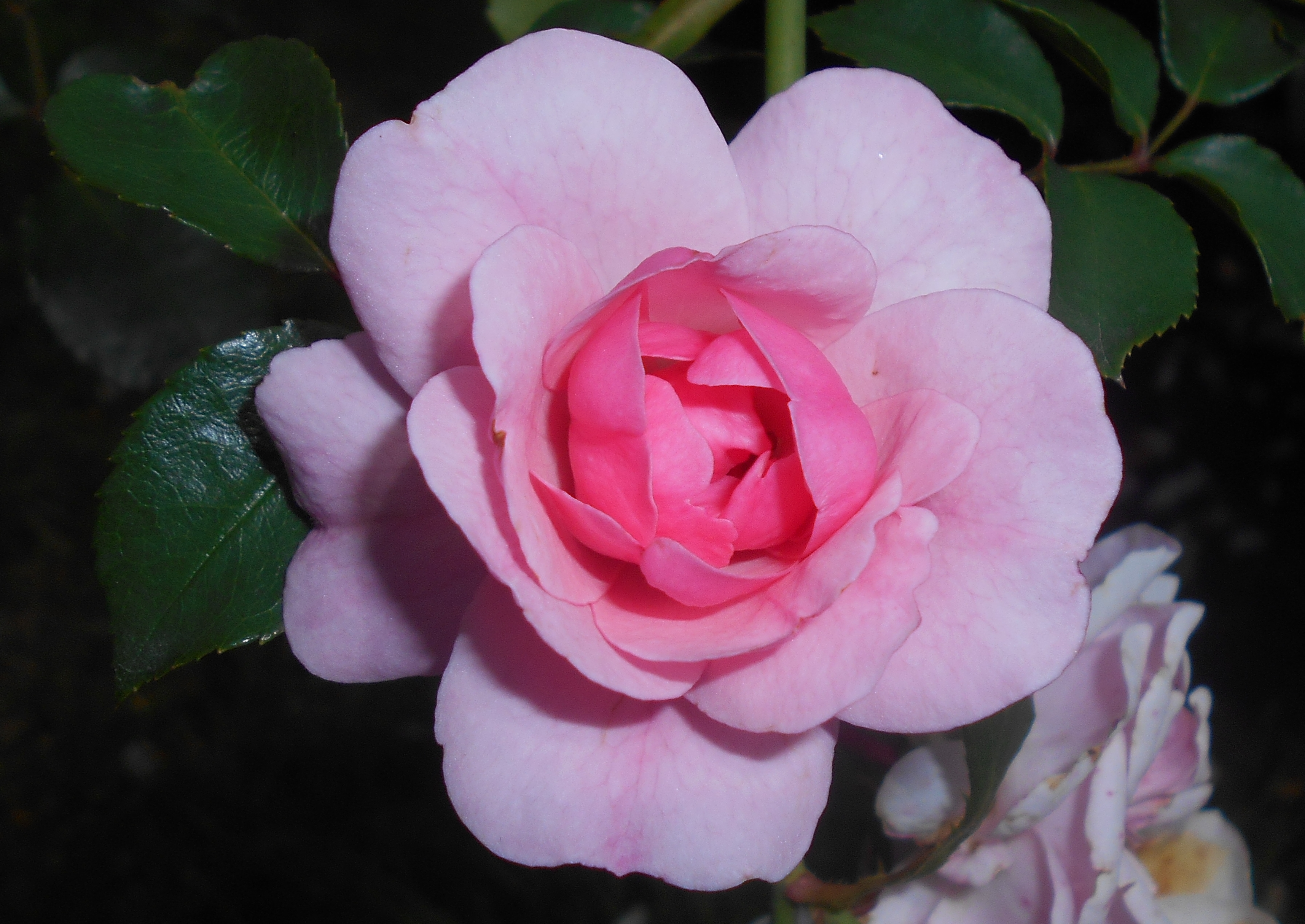 Róża ‘Bonica’ (Rosa ‘Bonica’), Ogród Botaniczny UMCS w Lublinie.